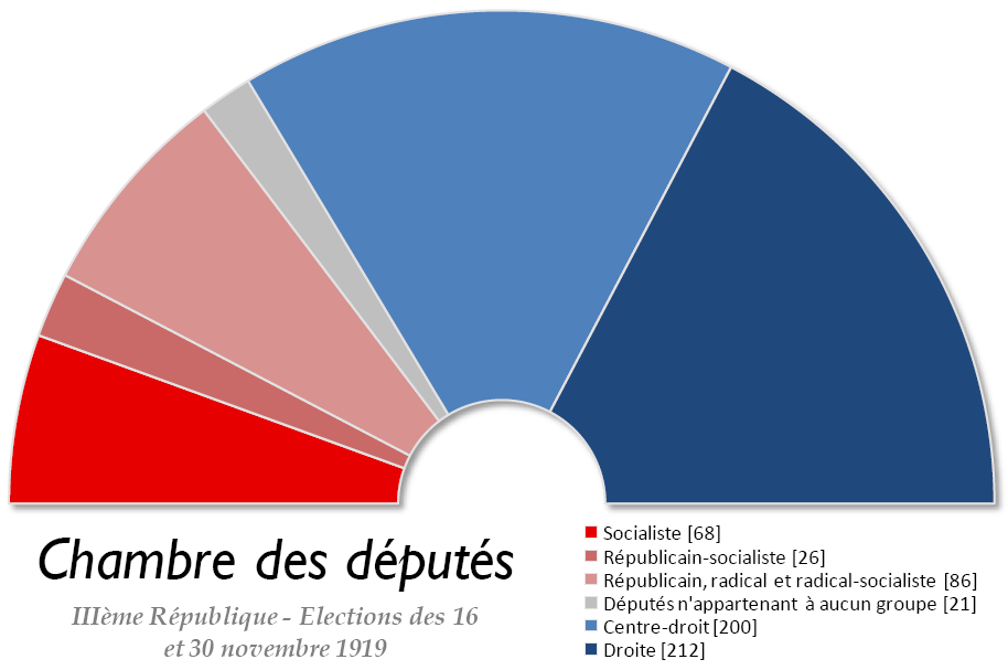 Chambre des députés française issue des élections législatives de 1919